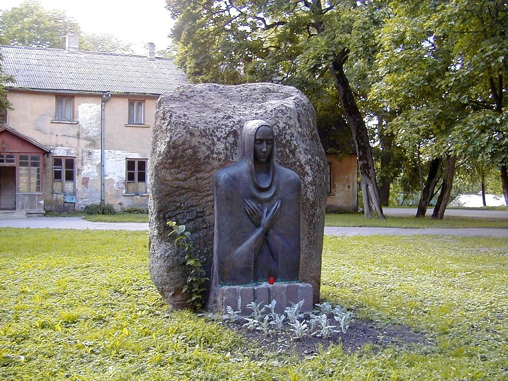 Nīca, piemineklis represētajiem 2000-07-08